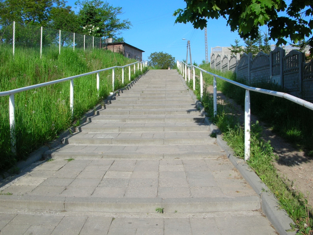 Schody na Zboczu Bydgoskim na Miedzyniu